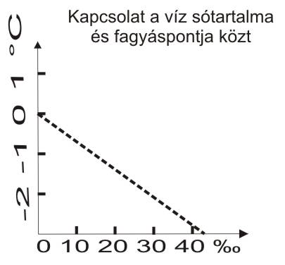 A víz sótartalma és fagyáspontja közti összefüggés grafikonos ábrázolása